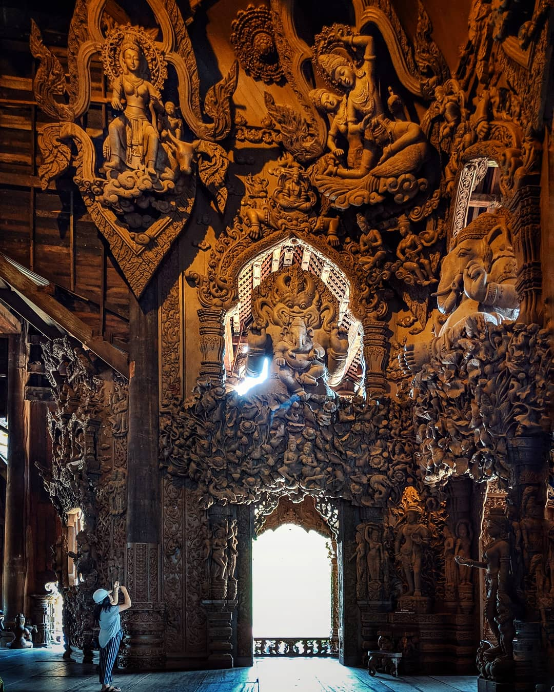 The sculptures adorn the inside of this temple!! Incredible beauty!